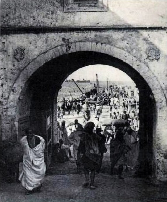 Bab El Marsa (porte de la mer) en 1911